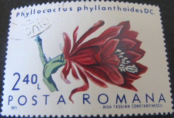 Source: Post of Romania